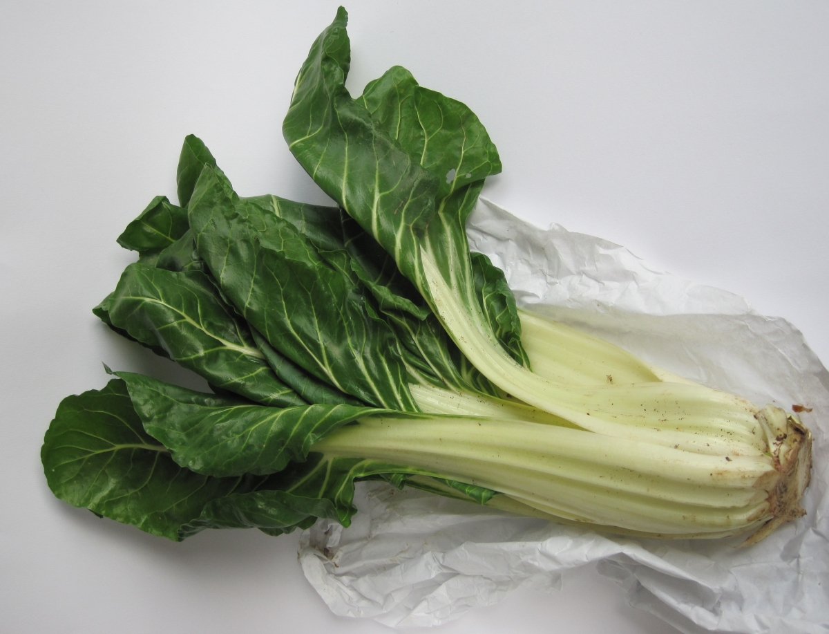 Deutscher Mangold